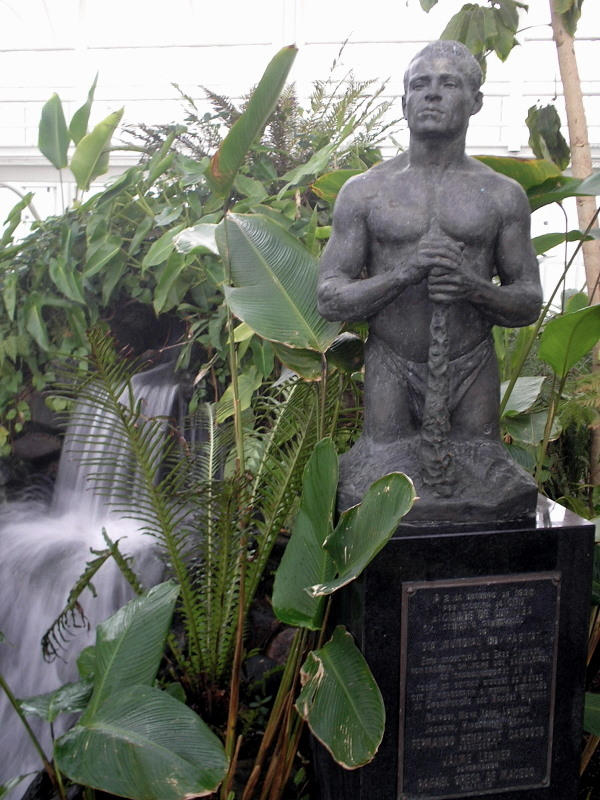 Escultura "Torso de Trabalhador", de Erbo Stenzel, localizada dentro da estufa principal do Jardim Botânico de Curitiba, PR, sul do Brasil.